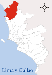 Localización del distrito de Ancon Esta imagen ha sido elaborada por --Edgardo Reyes 17:56 9 mar, 2005 (CET) Categoría:Mapas del Perú (imagen)